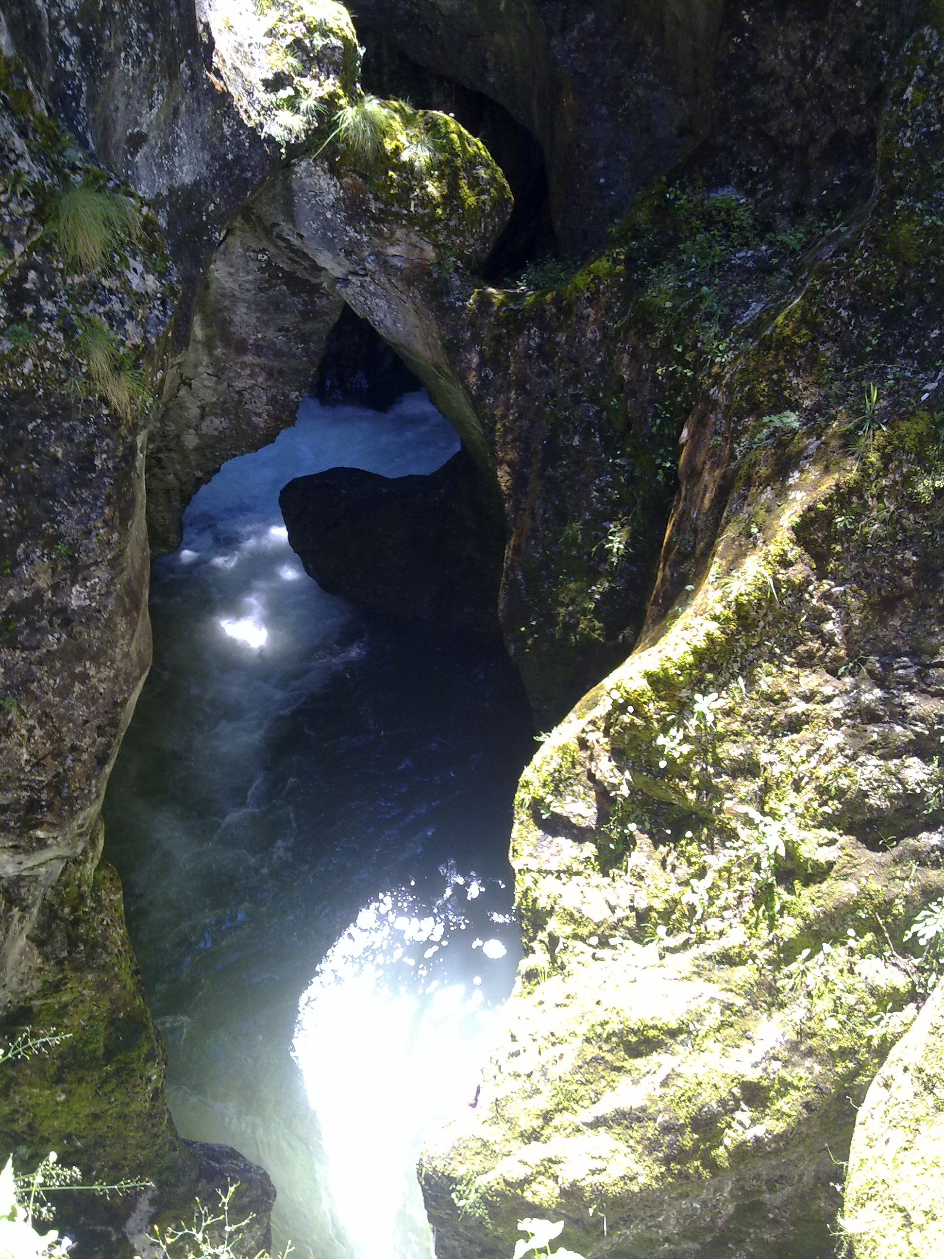 l'entrée de la gorge du Diable sur la route de Trigrad en Bulgarie.